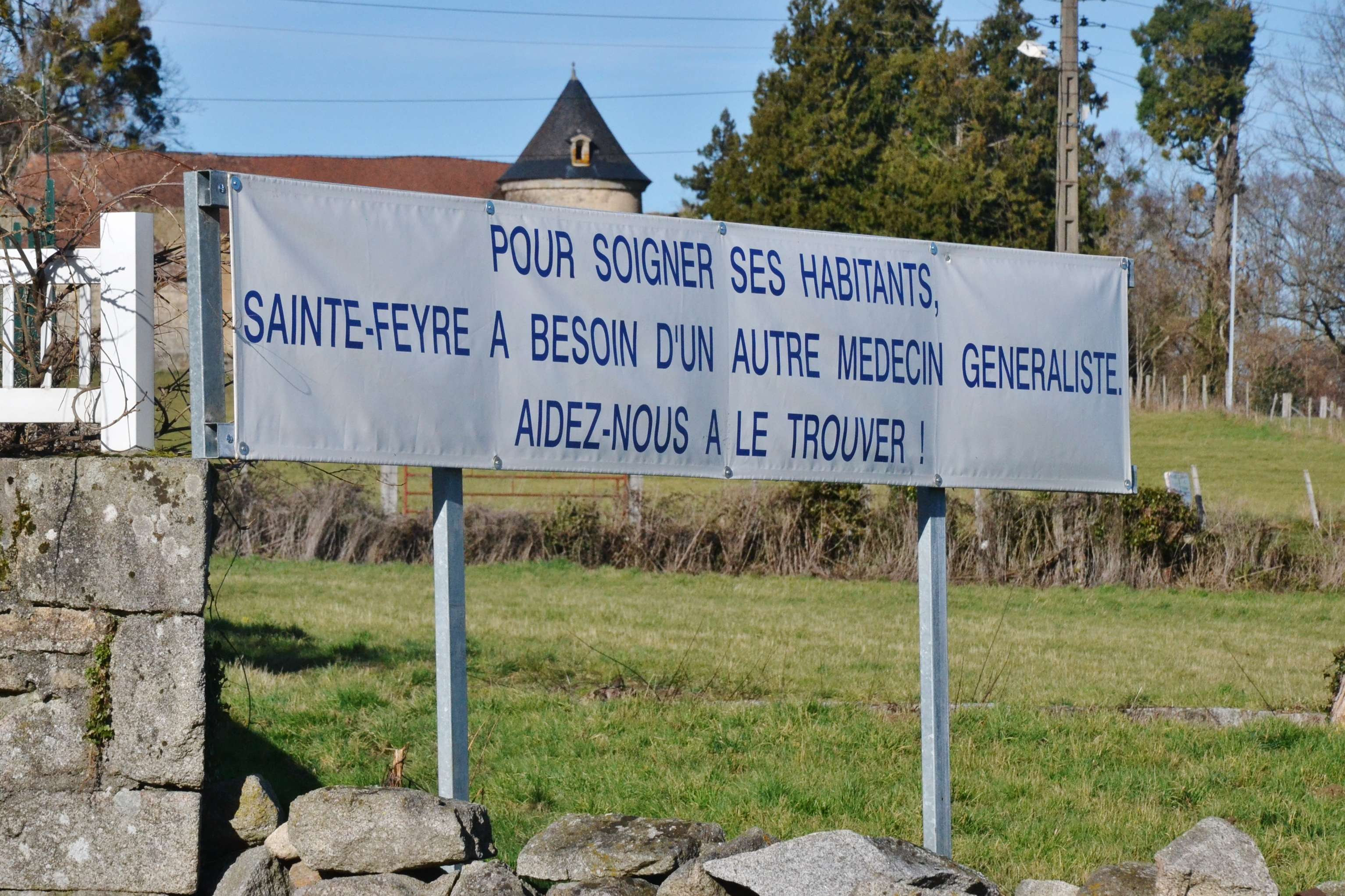 Banderole déployée à l'entrée du village de Sainte-Feyre (Creuse, France), déplorant la désertification médicale.